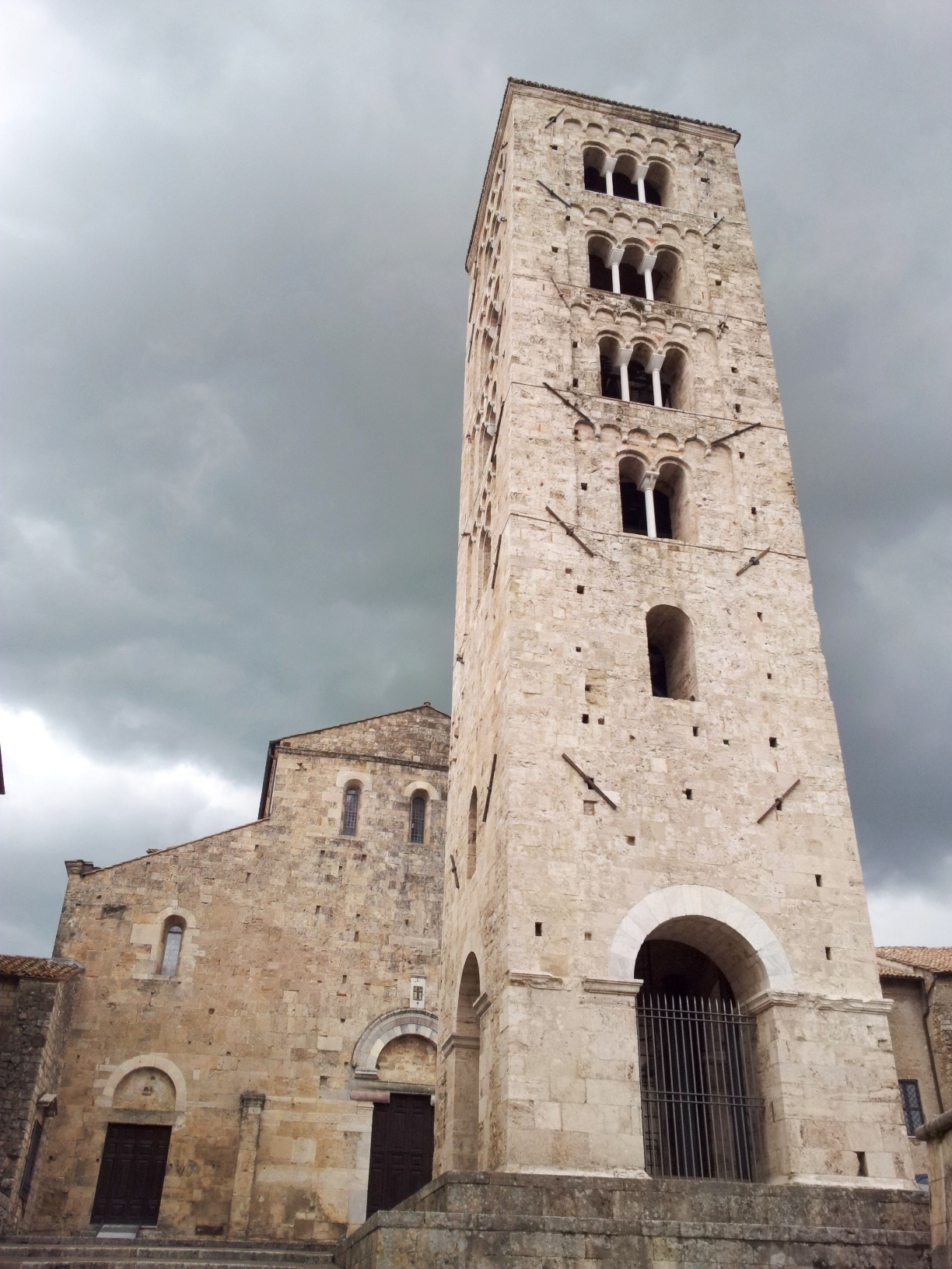 la facciata del Duomo di Anagni